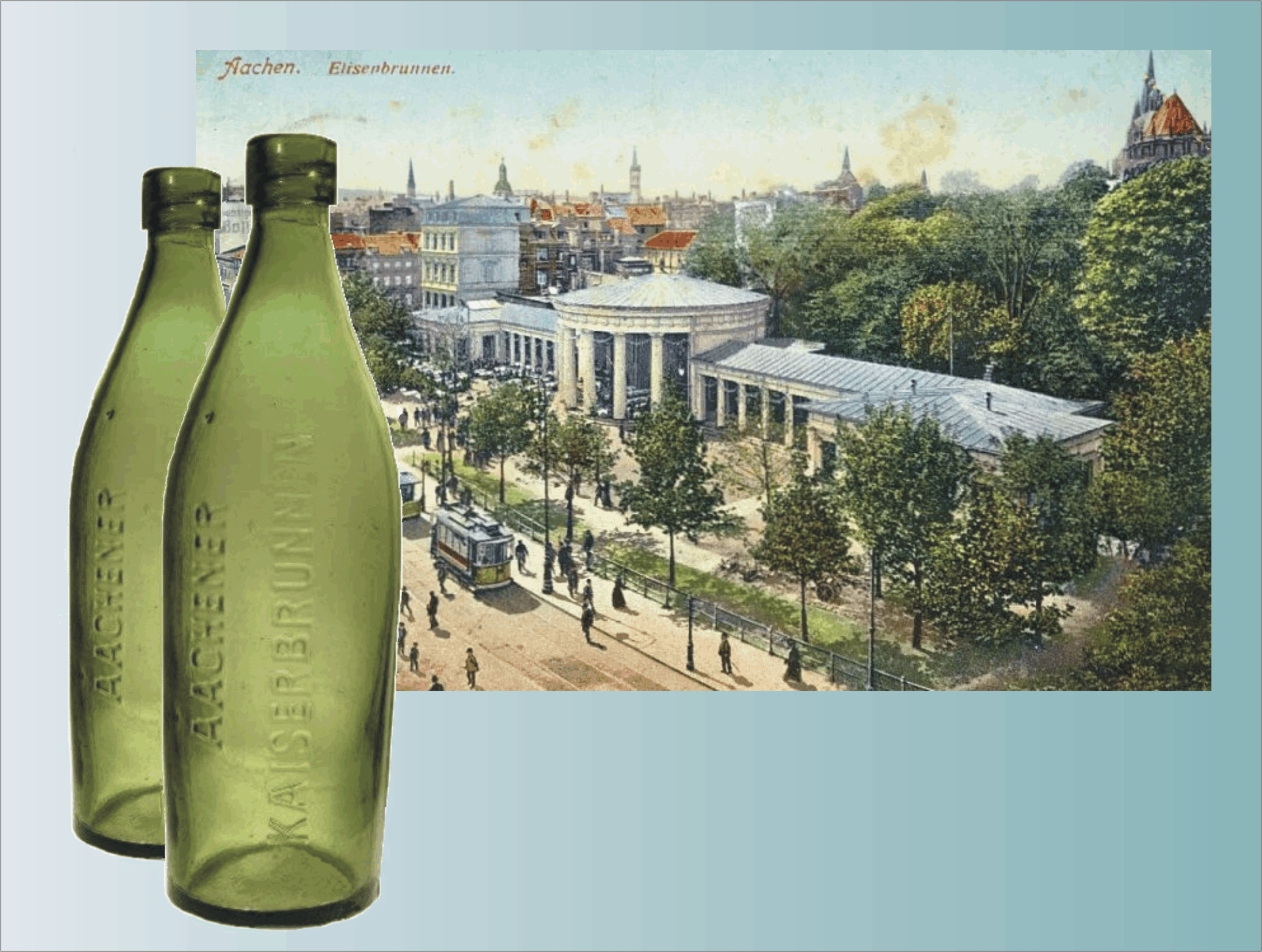 Flaschen des Aachener Kaiserbrunnens aus dem Jahr 1880 vor einer Postkarte mit Elisenbrunnen (Kaiserquelle) aus dem Jahr 1910